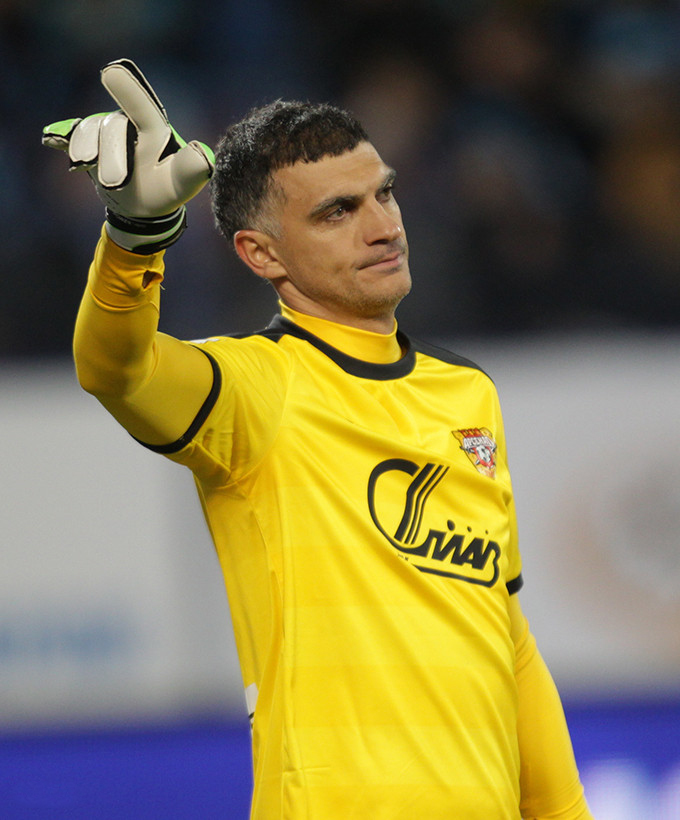 «Зенит» - «Арсенал» Тула